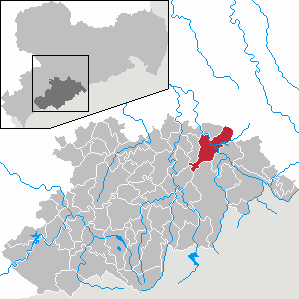 Lengefeld im Erzgebirgskreis, Sachsen